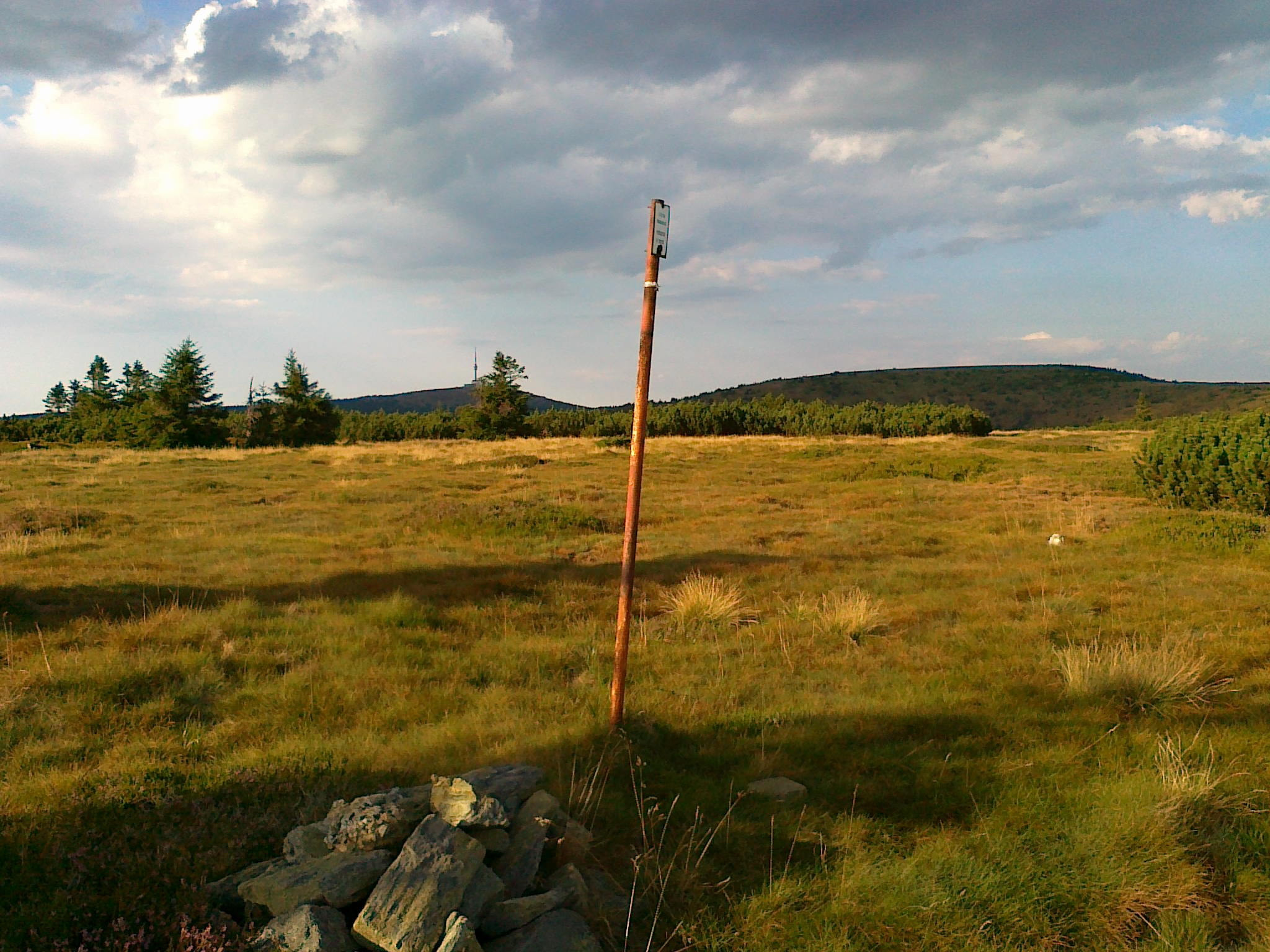 Punkt geodezyjny góry Velký Máj oraz widok na szczyty gór Praděd, Petrovy kameny i Vysoká hole